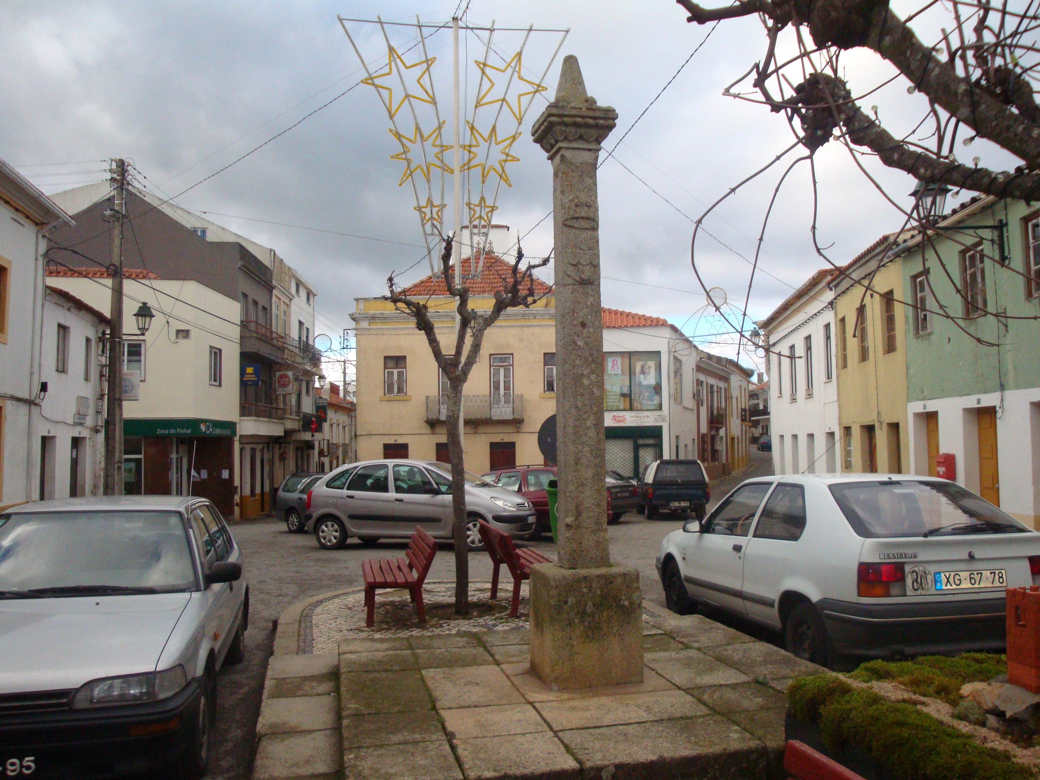 Cardigos, Portugal